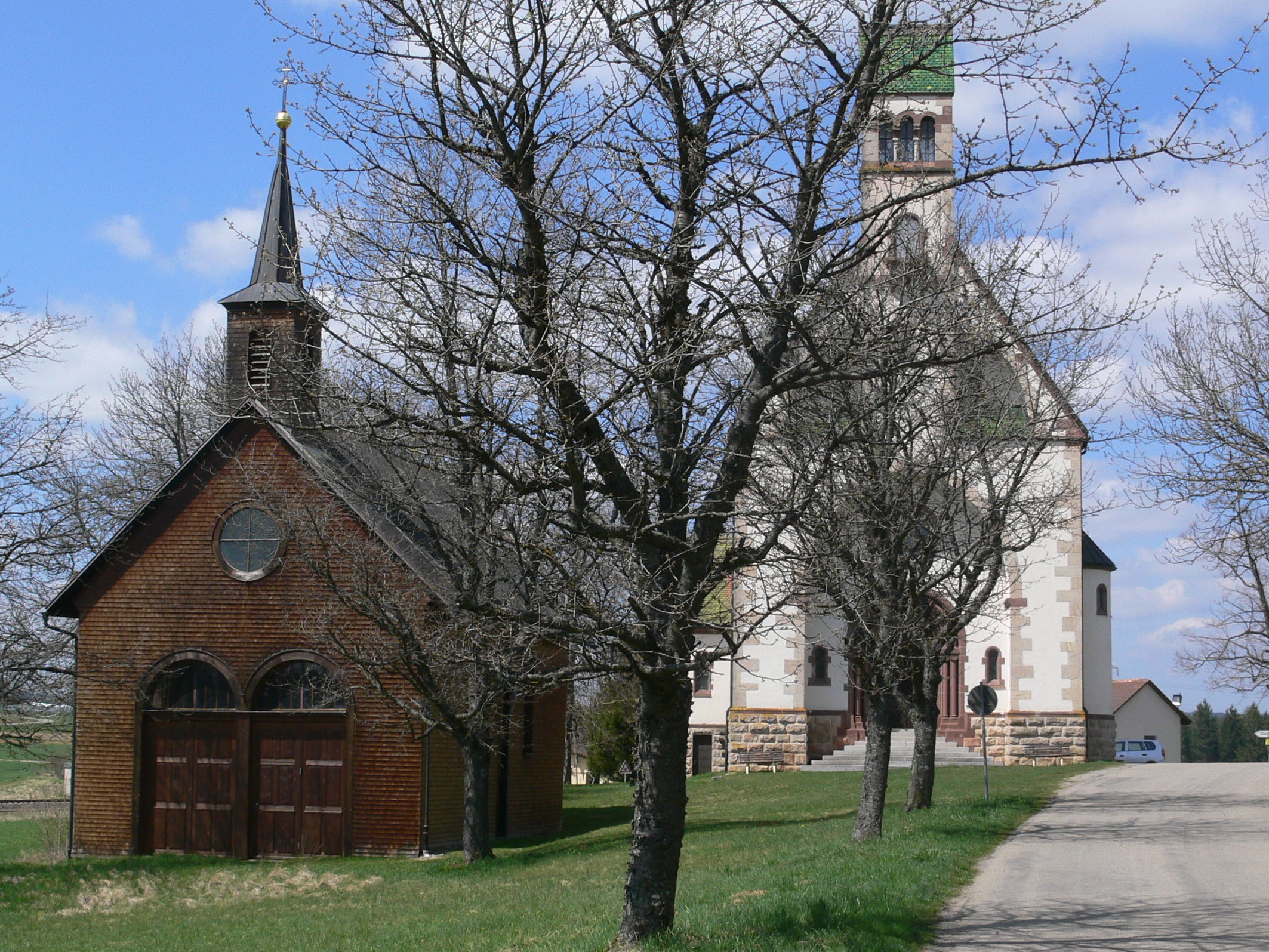 Wallfahrtskirche Maria Witterschnee (Schneekreuz), Löffingen Links: Alte Wallfahrtskapelle, rechts: Wallfahrtskirche